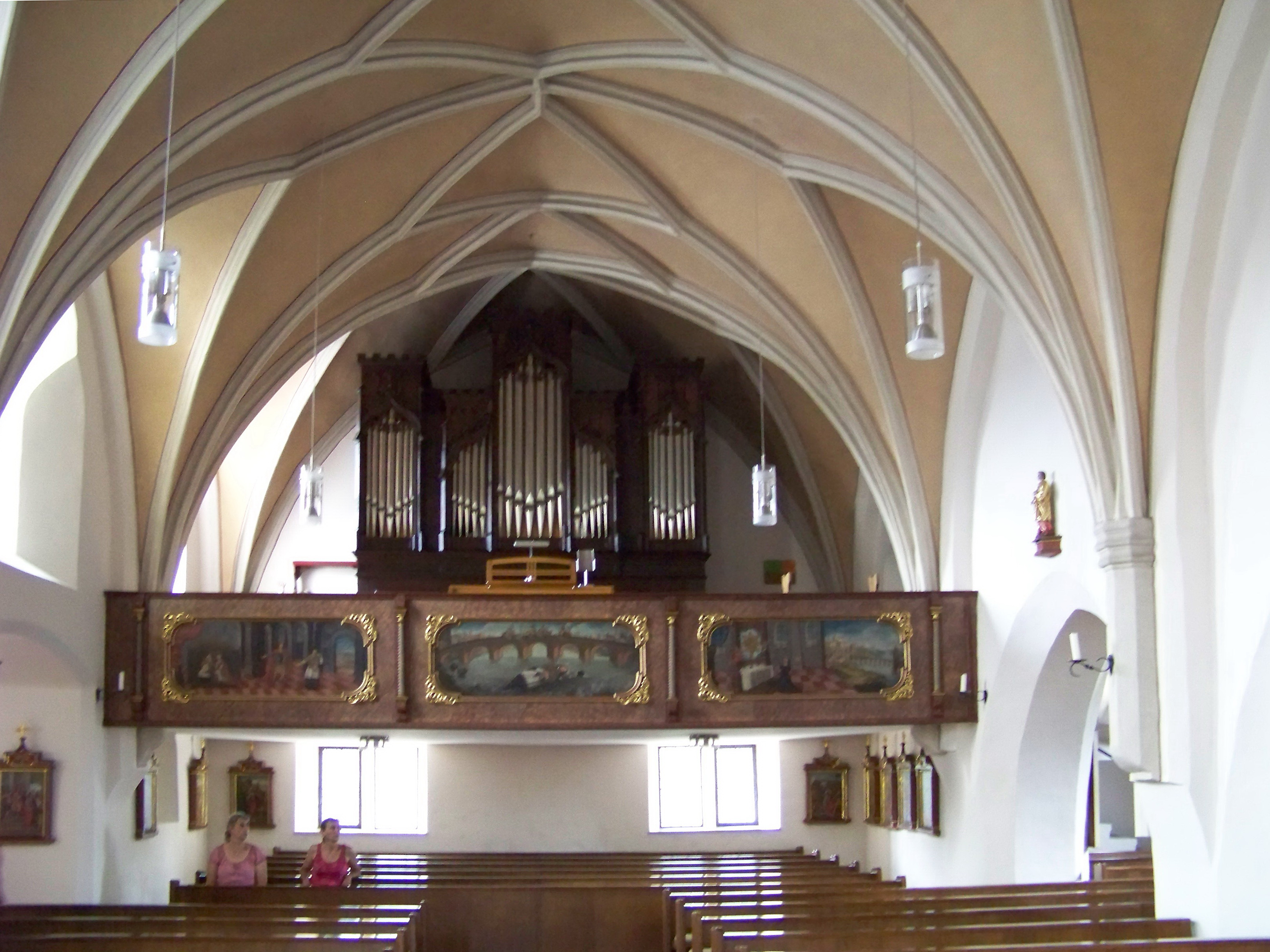 Kirchberg (Kröning) Pfarrer-Spirkner-Straße 5. Katholische Pfarrkirche St. Florian und St. Wolfgang. Saalbau mit eingezogenem Chor und angebauten Seitenschiffen. Anlage aus der zweiten Hälfte des 15. Jahrhunderts. Im Chor und Langhaus spätgotisches Netzgewölbe. Gerade Westempore mit drei bemalten Feldern und fünfteiliger Orgel.